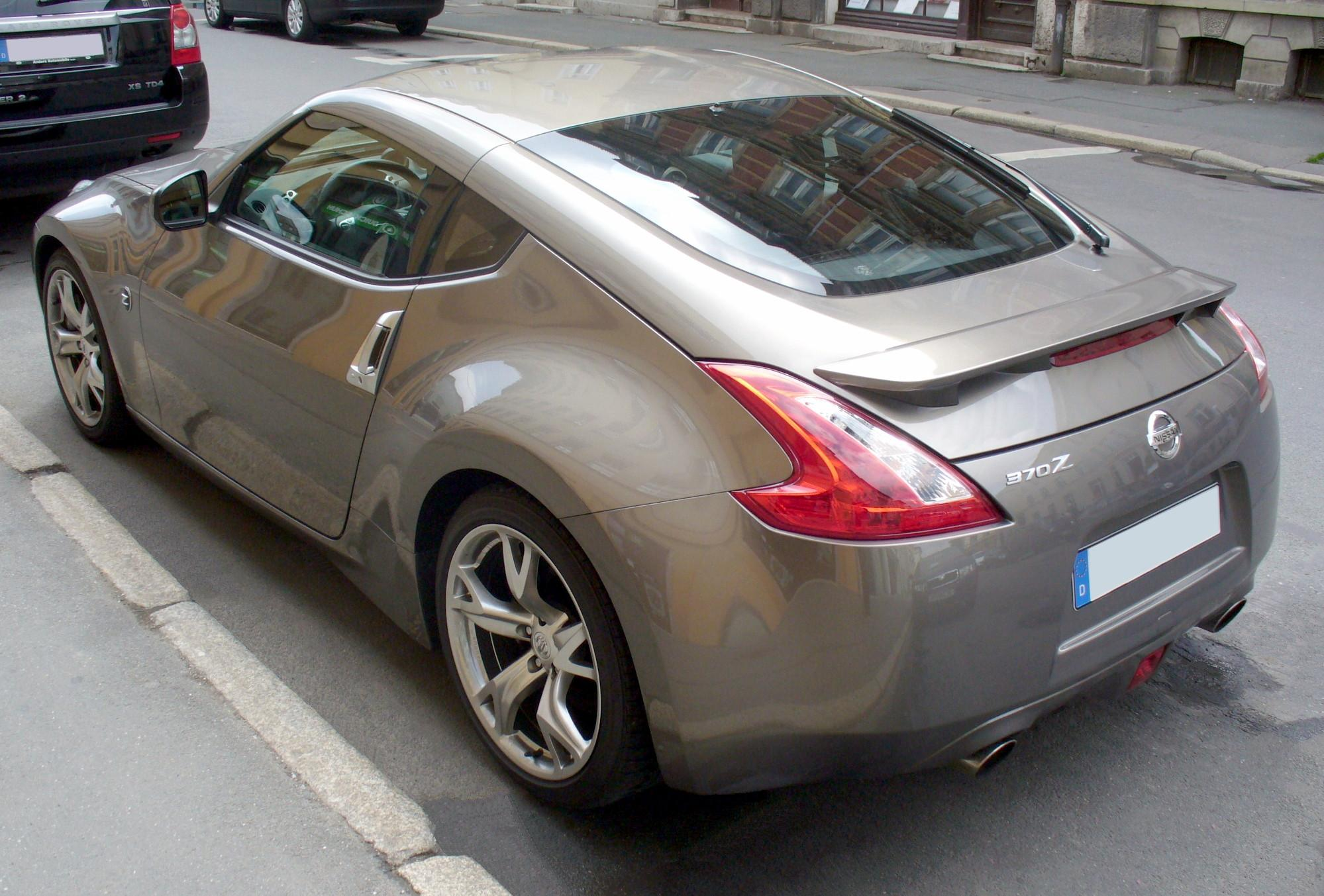 Nissan 370Z